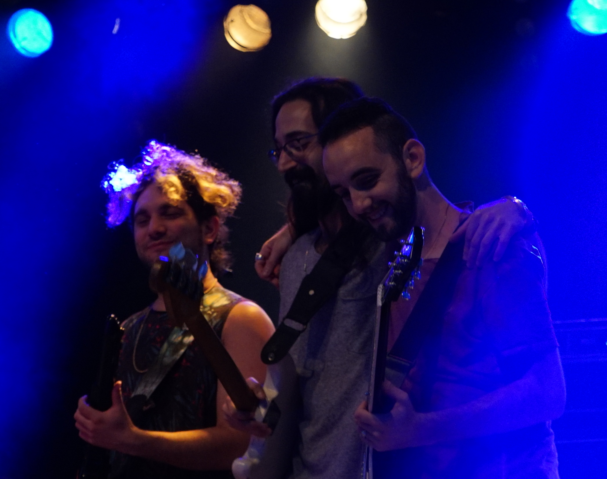 en concert lors de " Musiques d'ici et d'ailleurs" à Chalons.